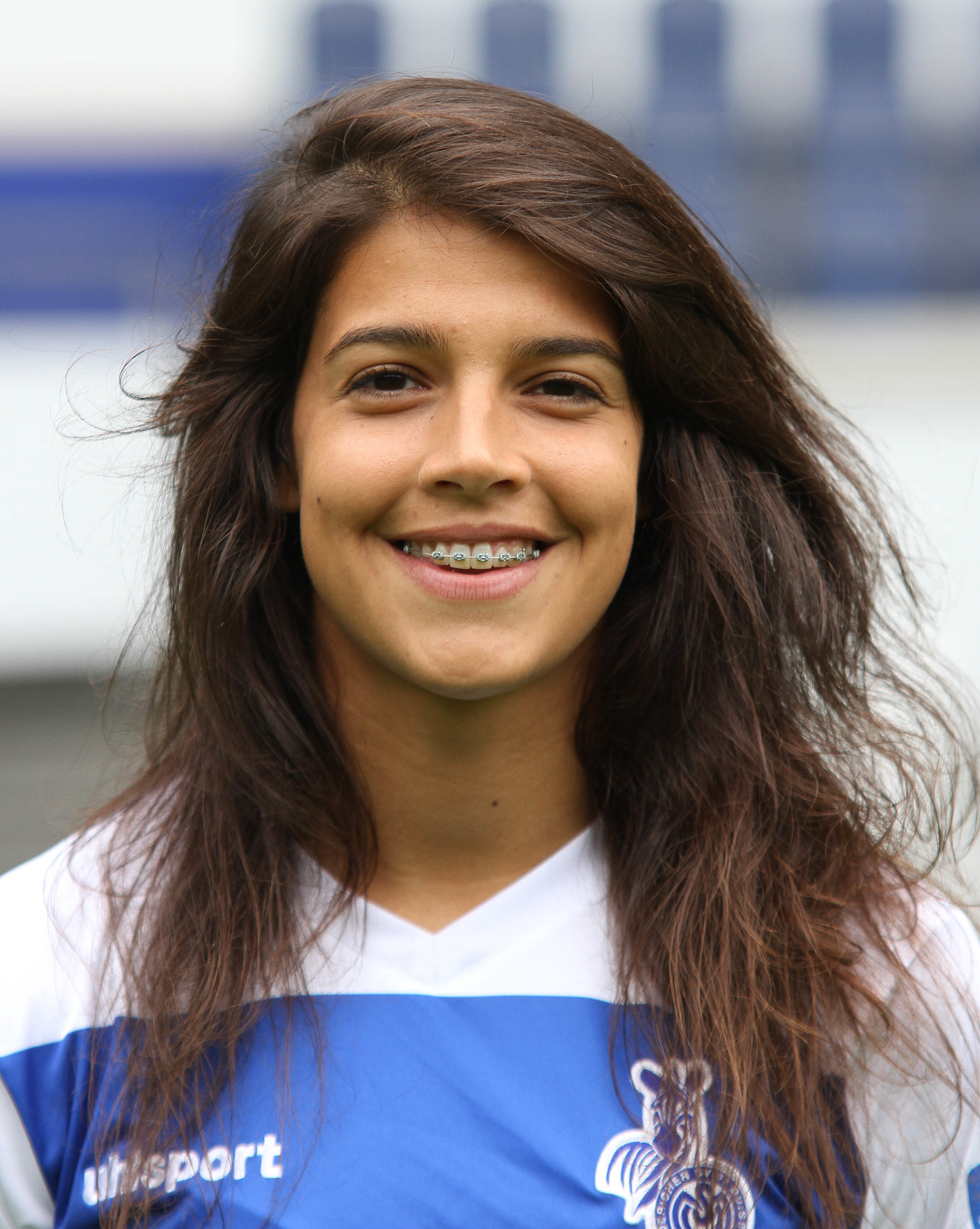 Carole da Silva Costa (2014)